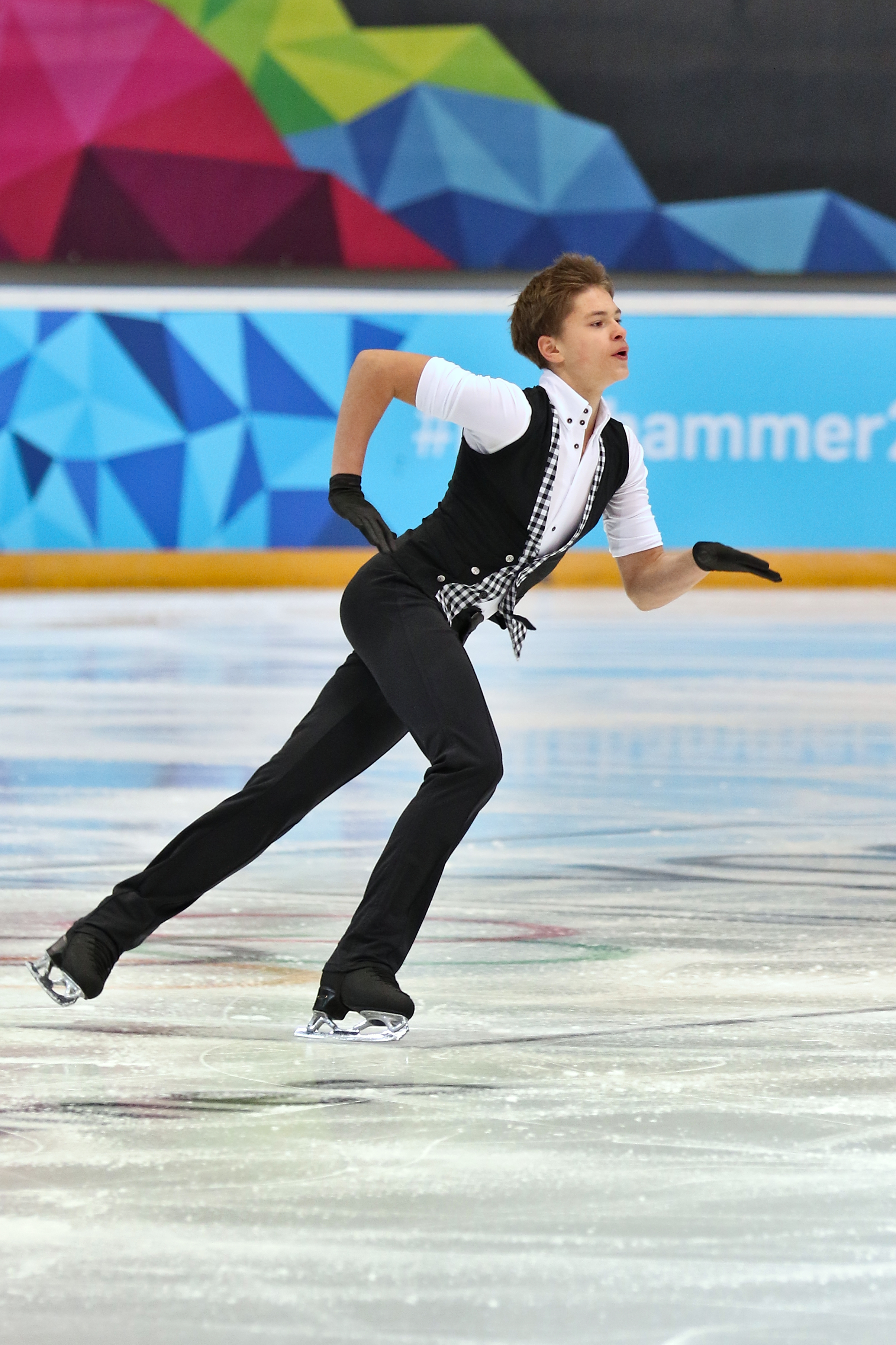 Lillehammer 2016 - Figure Skating Men Short Program - Deniss Vasiljevs